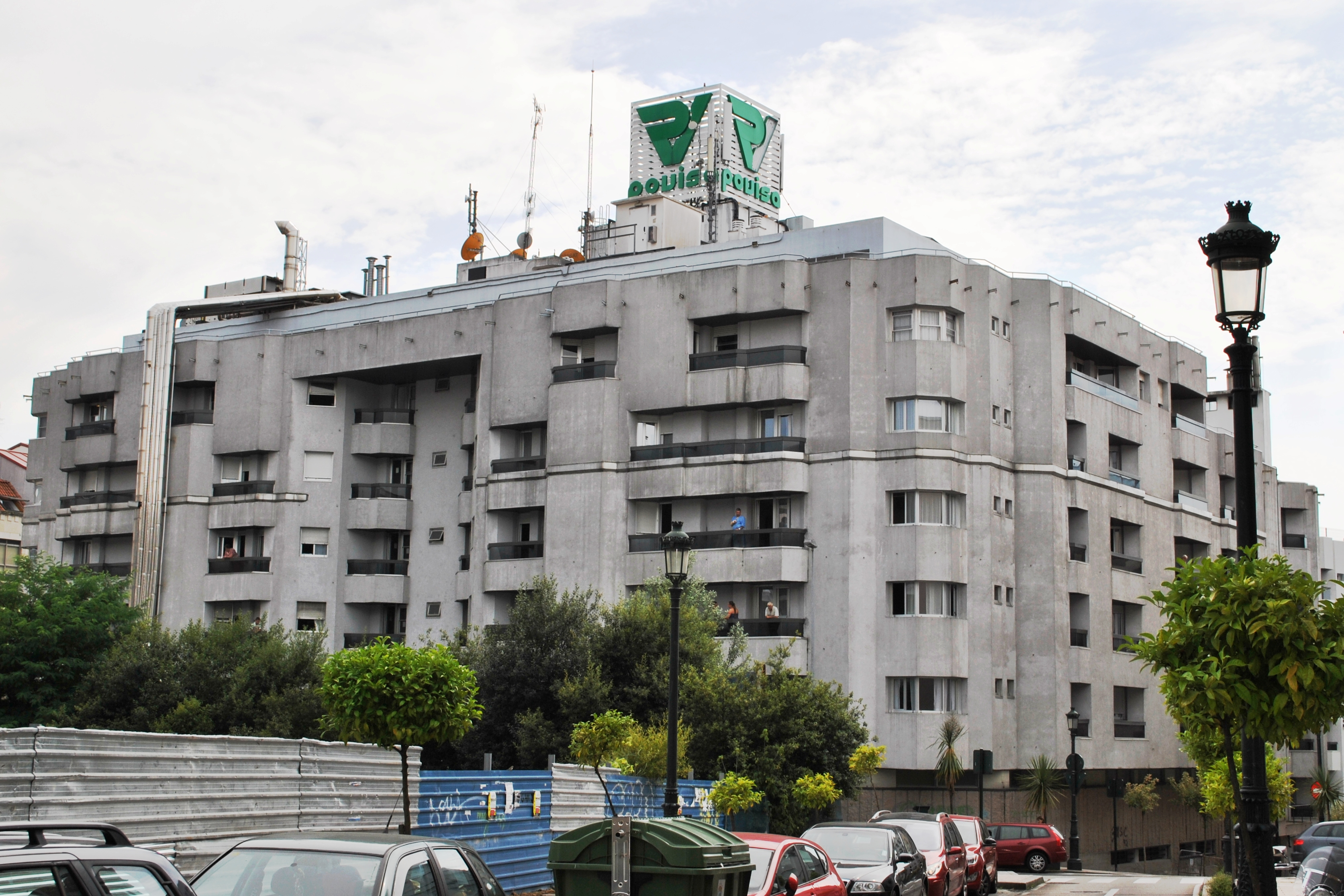 POVISA